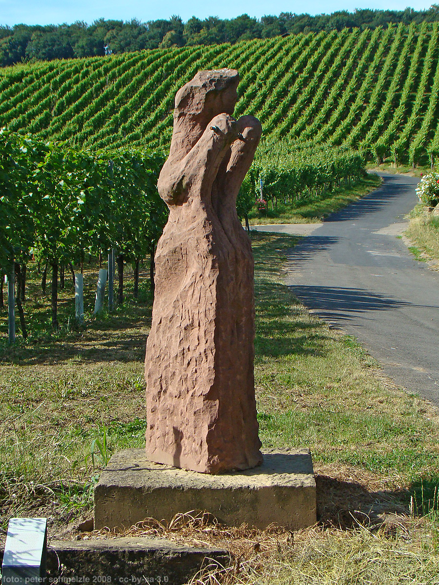 Studie zur „Schwarzen Hofmännin“ (1983) von Dieter E. Klumpp am Wein-Panorama-Weg längs des Wartbergs in Heilbronn